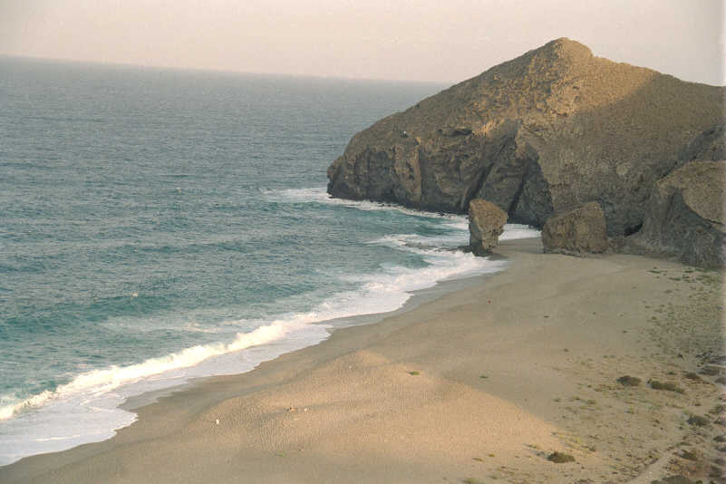 Playa de los Muertos en el Parque Natural de Cabo de Gata en la provincia de Almería, (España), cerca de Carboneras. Coladas de lava en contacto con el mar. Tomada por --JMSE el 22 de junio de 2003 y cedida a Wikipedia.